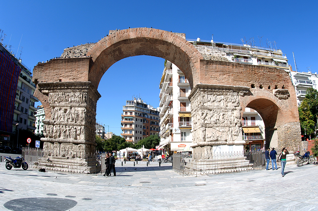 Rfmara